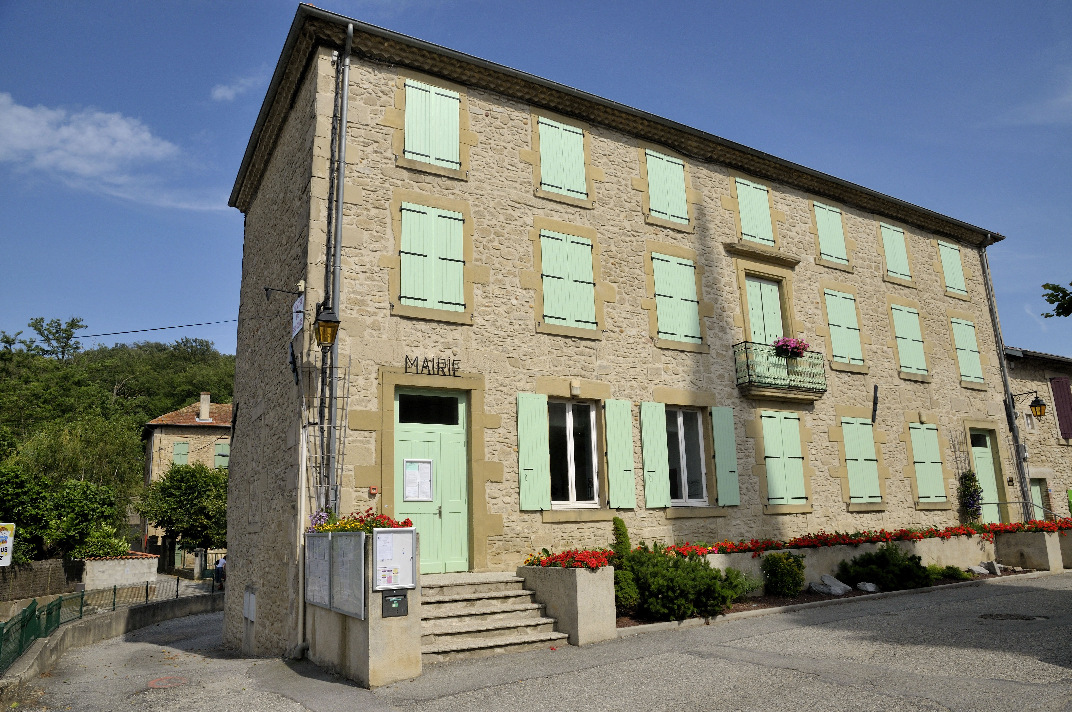 la mairie